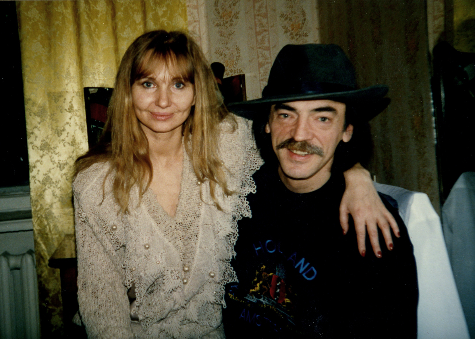 Лариса Регинальдовна Луппиан и Михаил Сергеевич Боярский